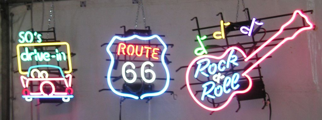 Insegne luminose al Summer Jamboree di Senigallia.